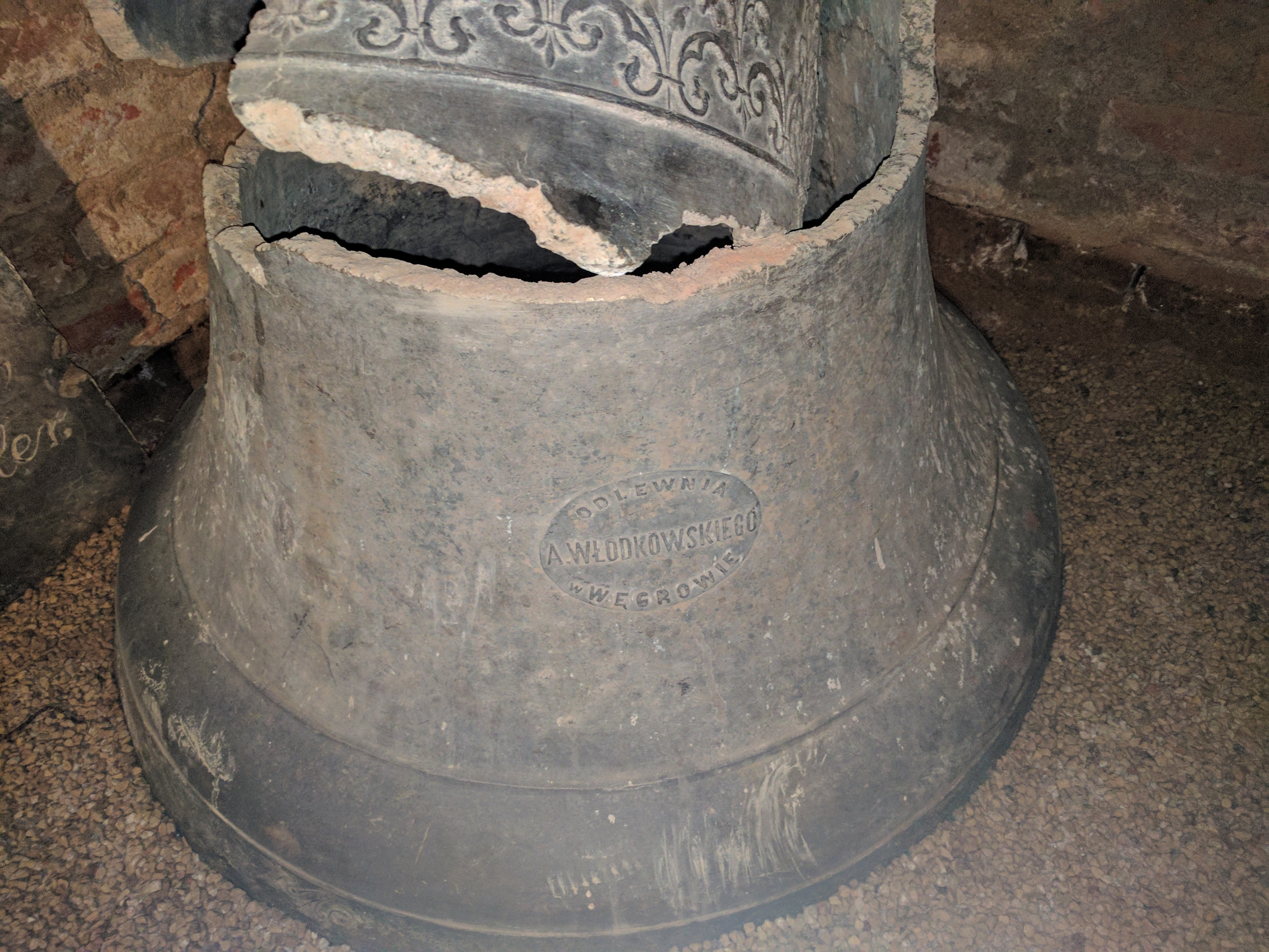 Uszkodzony w pożarze kościoła dzwon z ludwisarni Włodkowskich w Węgrowie znajdujący się w katakumbach kościoła w Wielonach (Viļāni) w Polskich Inflantach (dziś - Łotwa)